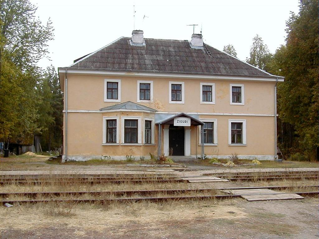 Žīguru stacija (nu jau bijusī) 2002-09-14